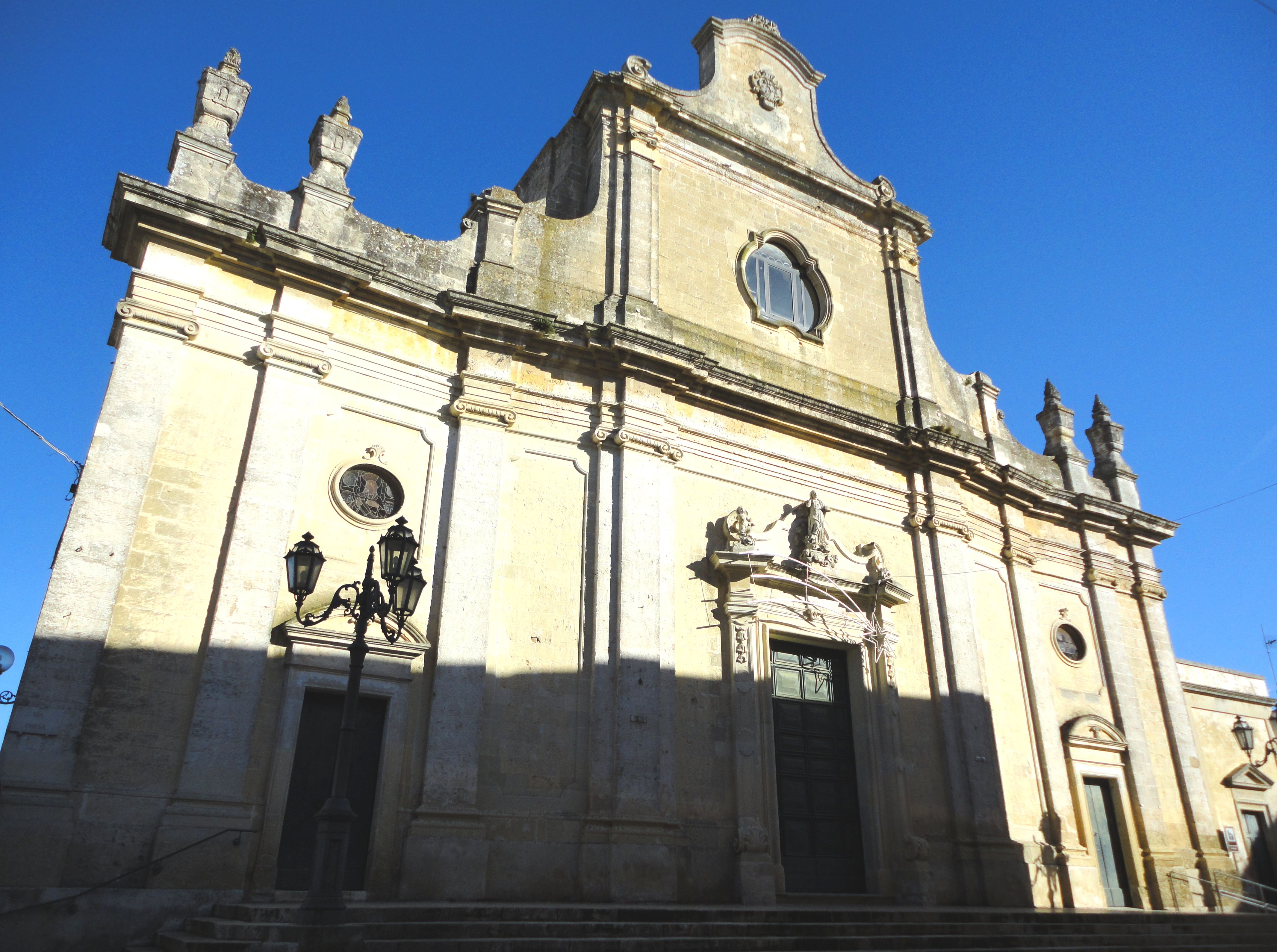 Chiesa di San Giorgio Spongano, Lecce